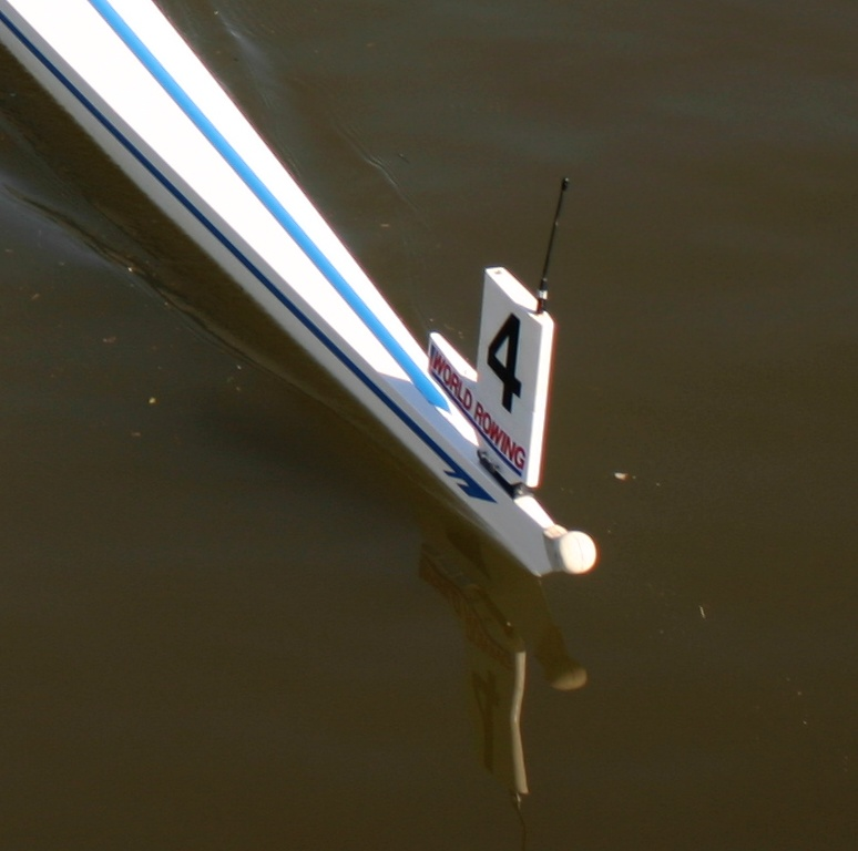 Número y portanúmero identificativos de la calle de un bote en una competición internacional de la FISA, con antena para registrar ritmo y velocidad entre otros.